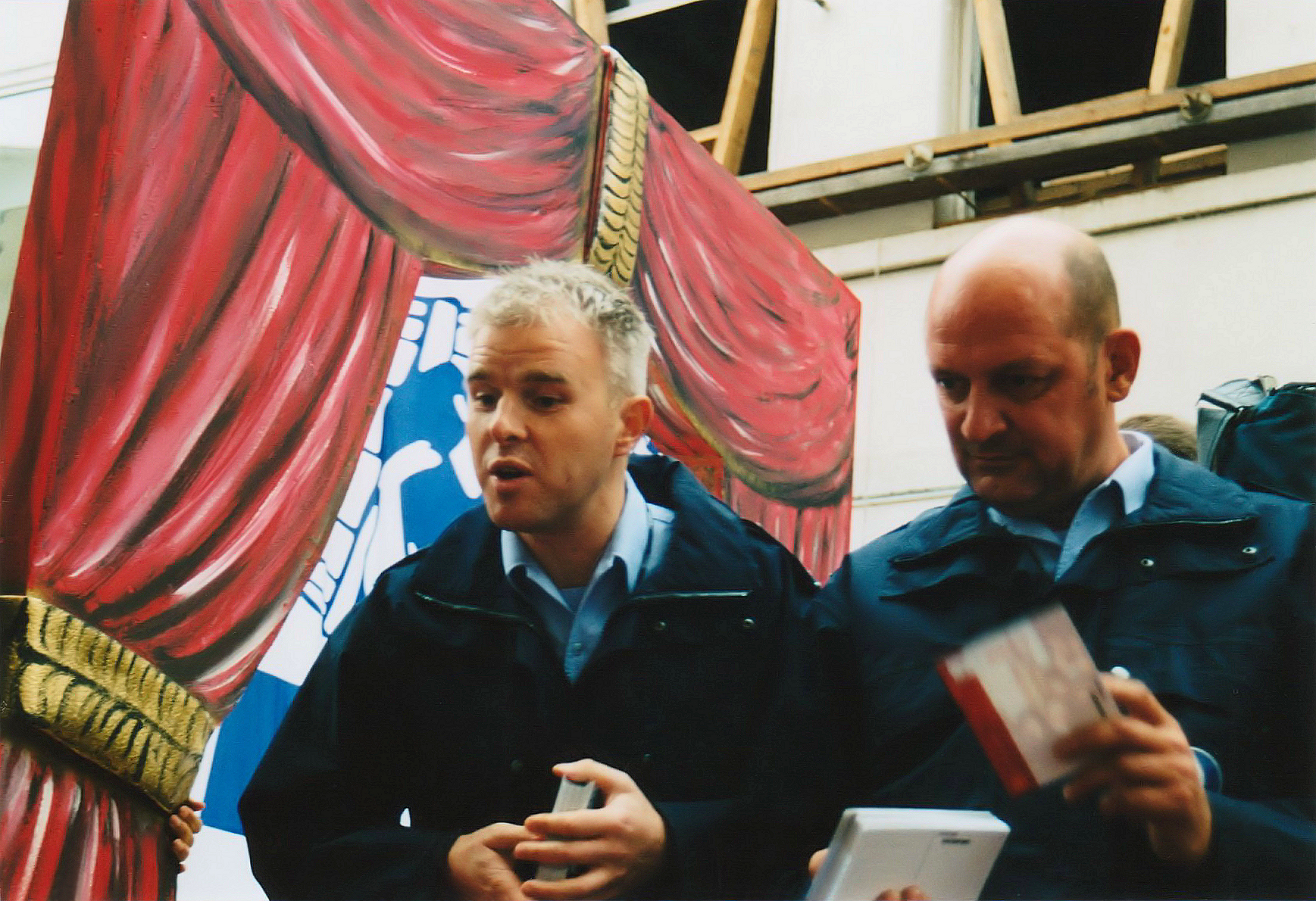 Mark Tijsmans op Flikkendag 2003 in Gent.